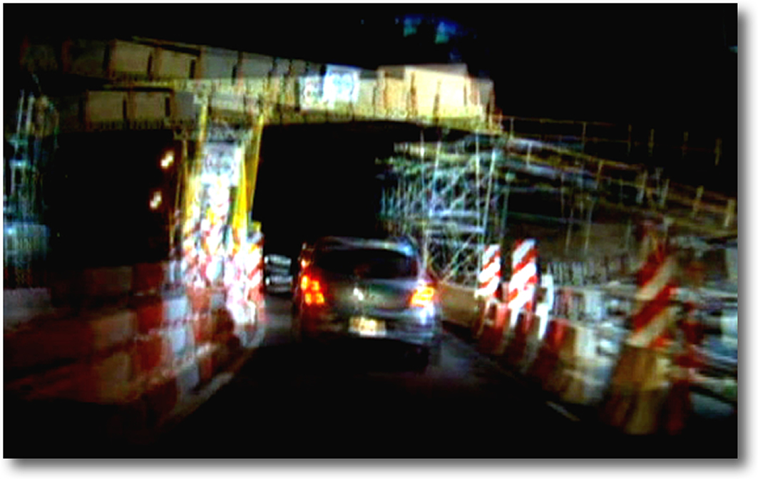 SOM night altered vision